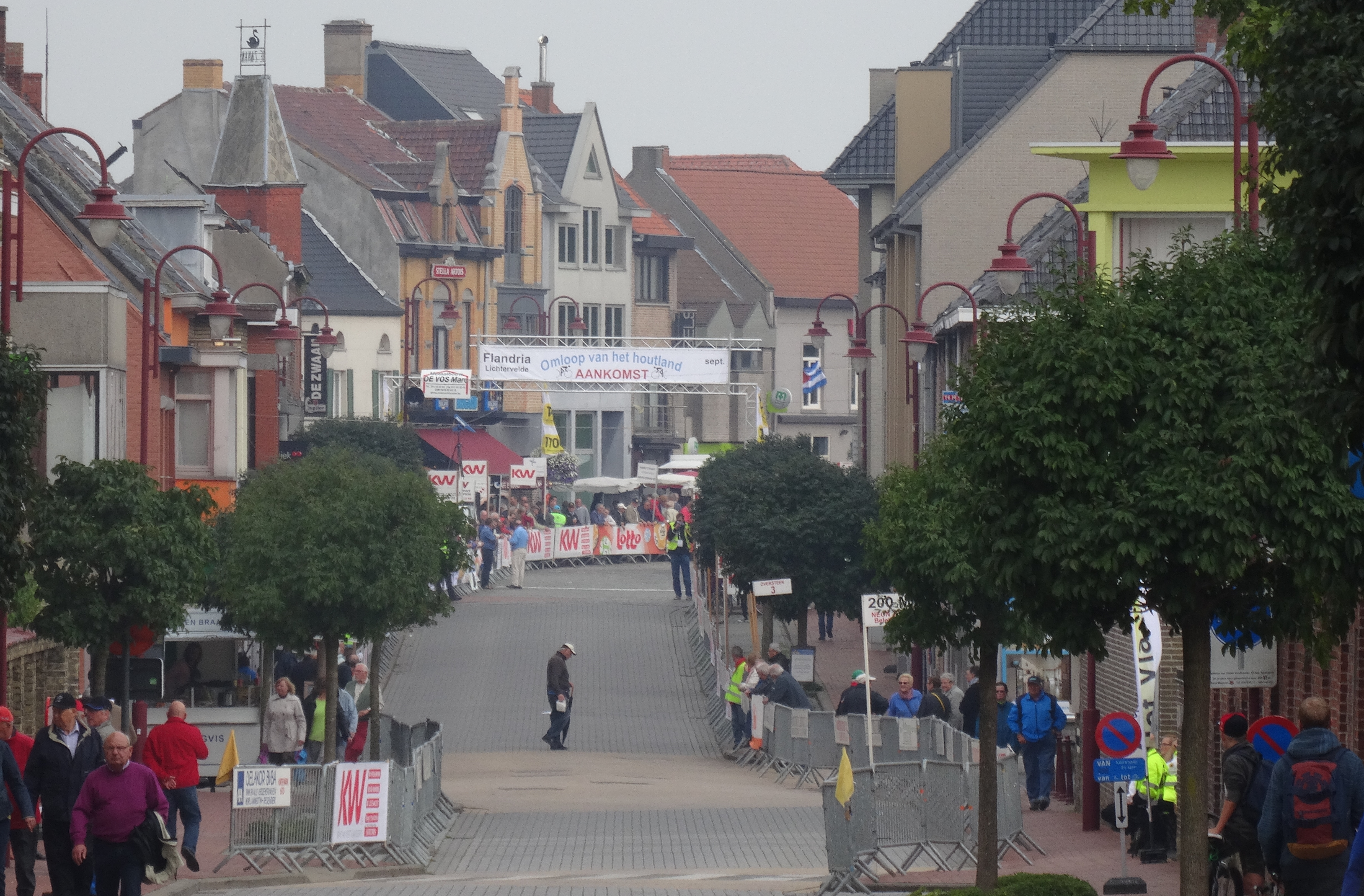 Reportage photographique réalisé le mercredi 24 septembre à l'occasion du départ et du début de la course du Circuit du Houtland 2014 à Lichtervelde, Belgique.